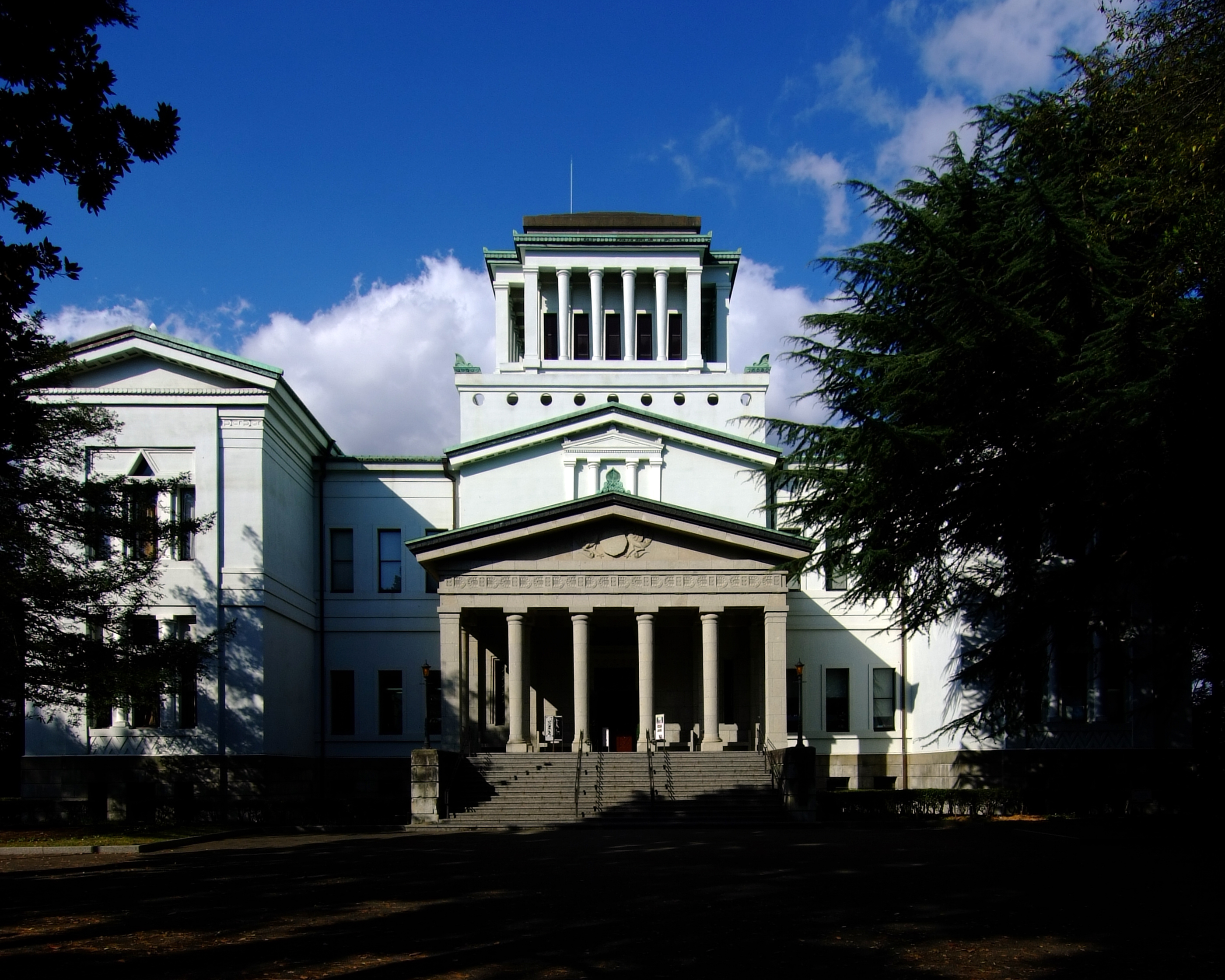 Okurayama Memorial Hall, at Yokohama Kanagawa Japan. Design by Uheiji Nagano in 1932.